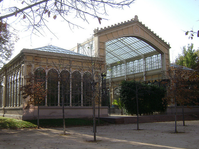 L'Hivernacle al Parc de la Ciutadella.